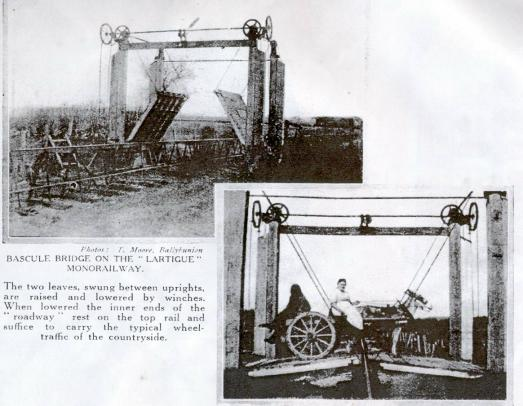 Lartigue Monorail